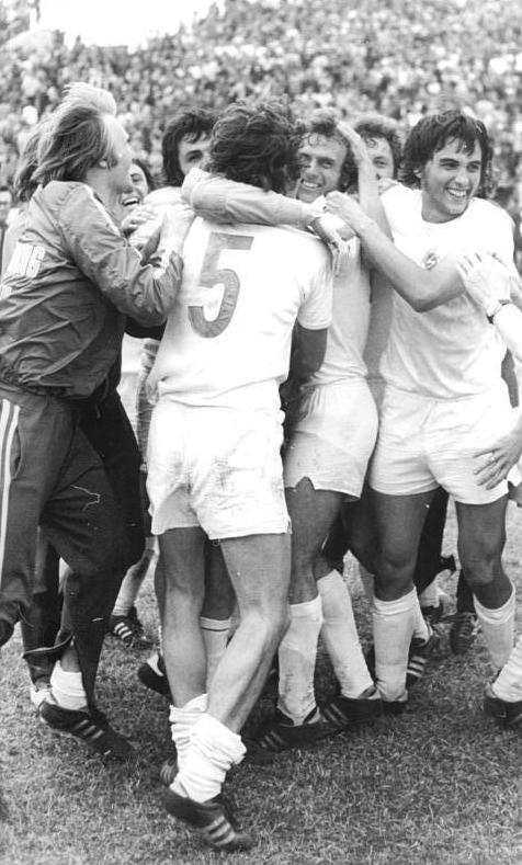 ADN-ZB-Lehmann-14.6.75-str-Berlin: Finale um den FDGB-Pokal im Fußball SG Dynamo Dresden - BSG Sachsenring Zwickau- Riesenjubel bei den Spielern aus Zwickau. Nach hochdramatischem Spiel, das nach 90 Minuten 1:1 und nach Verlängerung 2:2 stand wurde das Elfmeterschießen mit 4:3 gewonnen.